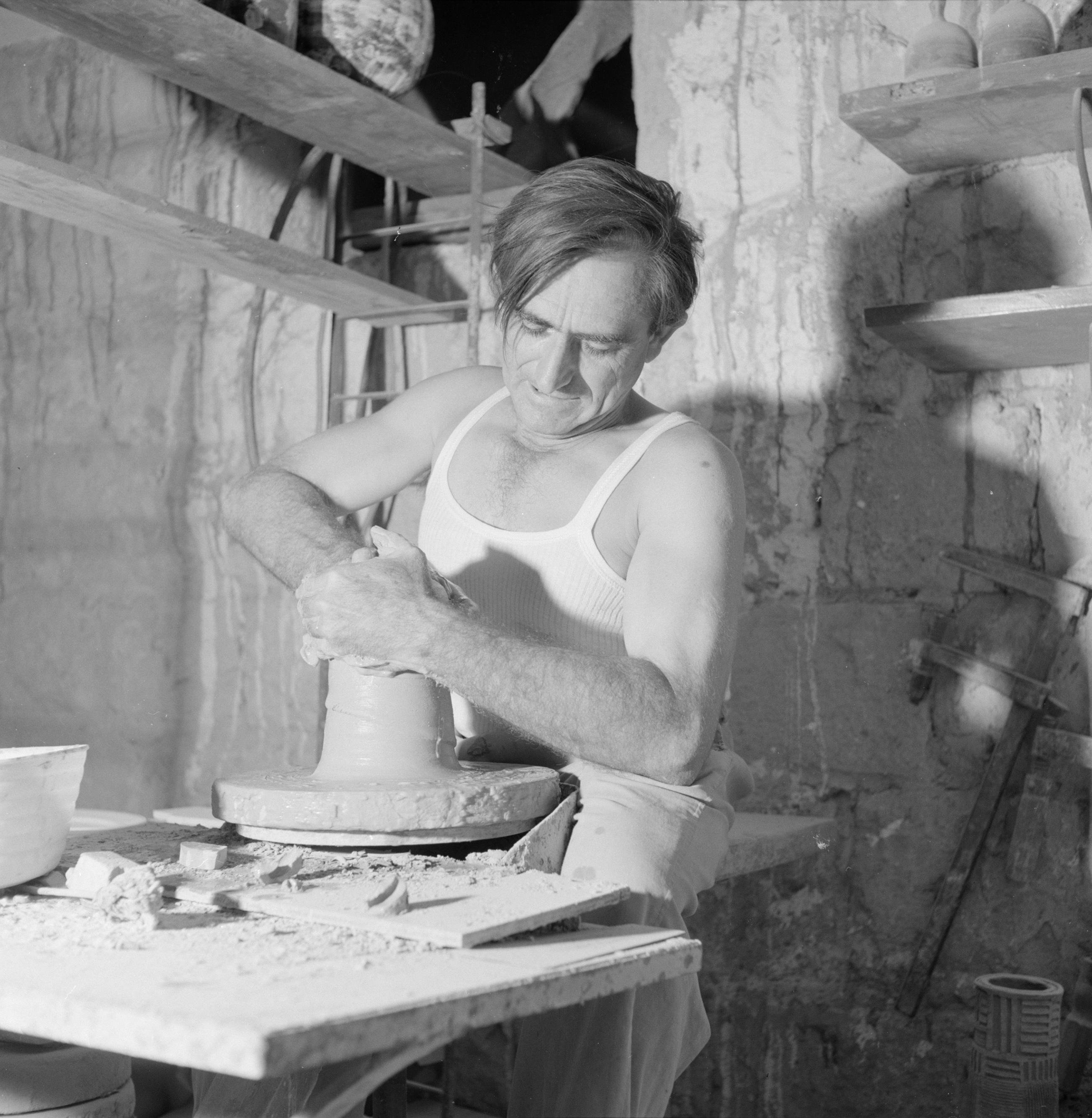 Collectie / Archief : Fotocollectie Van de Poll Reportage / Serie : Israël 1964-1965. Ein Hod Beschrijving : Kunstenaarskolonie Ein Hod. Een pottenbakker bezig met het draaien van aardewerk Annotatie : Ein Hod is een kunstenaarskolonie ten zuiden van de berg Carmel. Opgericht door de Dada-kunstenaar Marcel Janco. Datum : 1964 Locatie : Ein Hod, Israël Trefwoorden : beeldend kunstenaars, keramiek, kunstenaarskolonies, pottenbakkers Fotograaf : Poll, Willem van de, [onbekend] Auteursrechthebbende : Nationaal Archief Materiaalsoort : Negatief (zwart/wit) Nummer archiefinventaris : bekijk toegang 2.24.14.02 Bestanddeelnummer : 255-2774